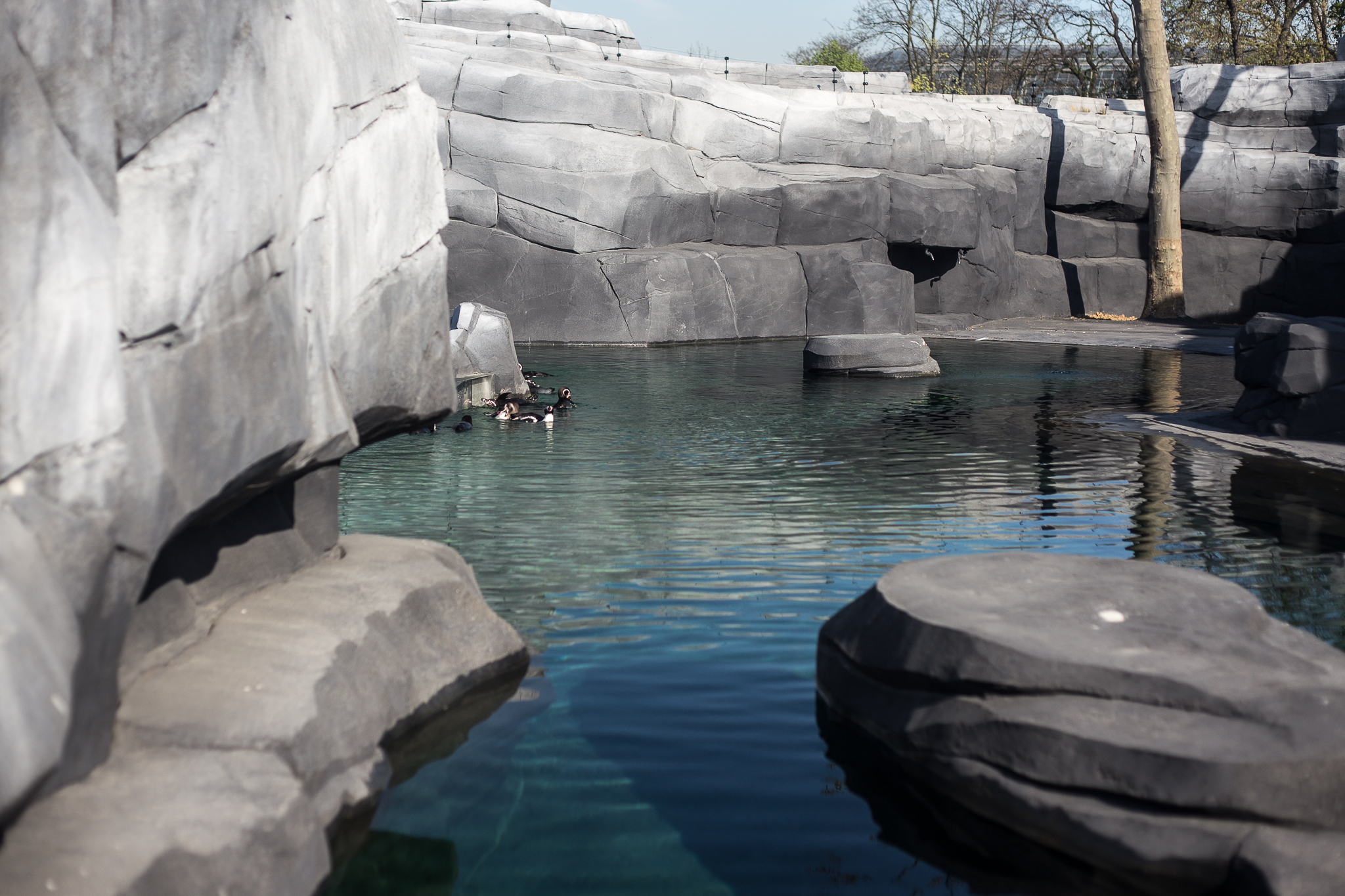 Parc Zoologique de Paris, France.